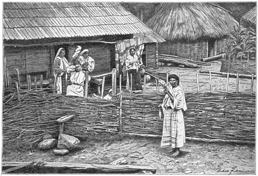 "Boerenhoeve uit de buurt van het klooster Bistritza"